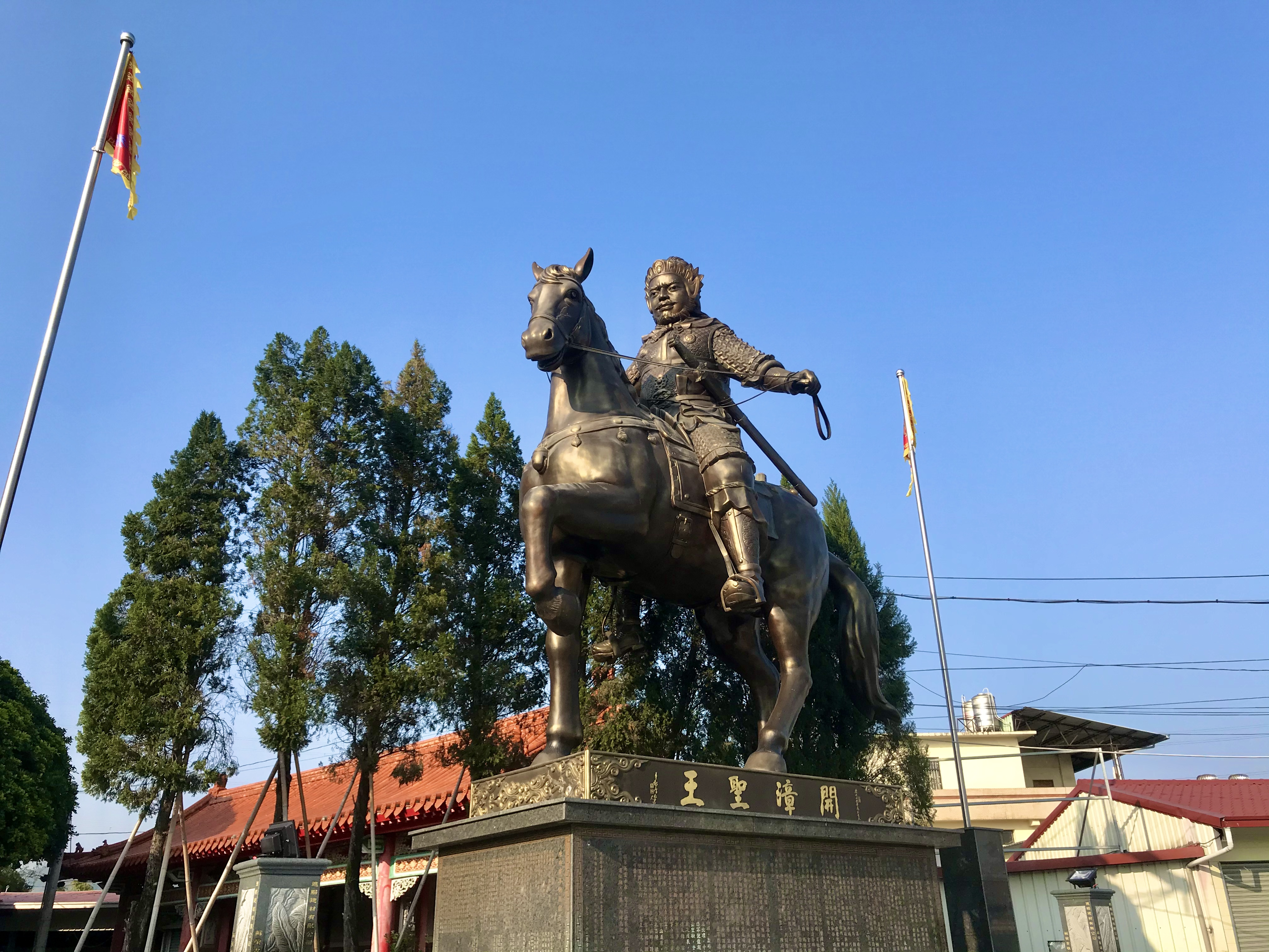 草屯陳府將軍廟開漳聖王騎馬像